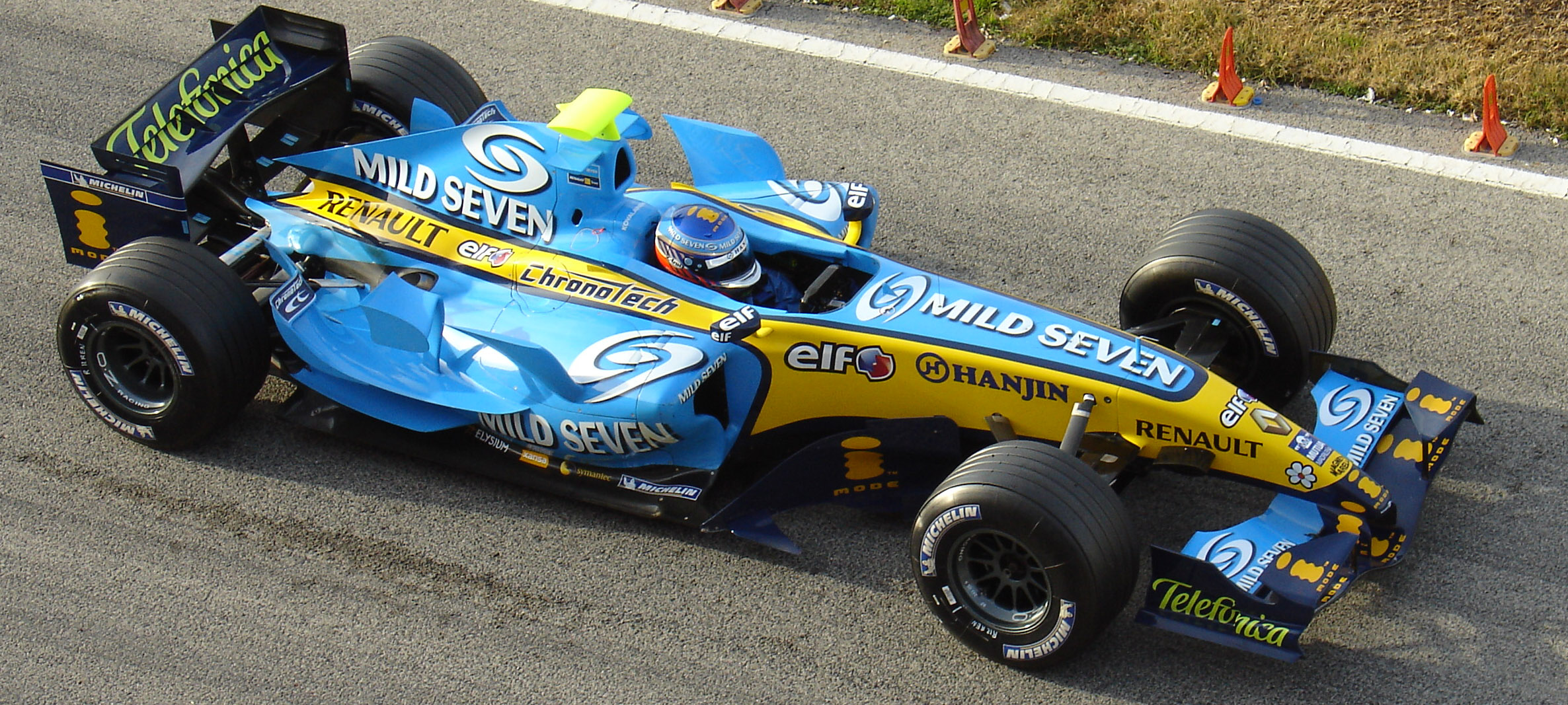 Heikki Kovalainen (Renault R26) at Cheste Circuit (Valencia)